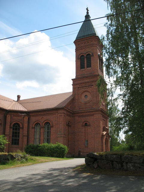 Lopen uusi kirkko, Loppi, Yleiskuva, Rakennettu vuosina 1885–1887 arkkitehti Constantin Kiseleffin laatimien piirustusten mukaan. Rakennettu uudelleen tulipalon jälkeen vuosina 1919–1921 entisen malliseksi käyttäen hyväksi vanhoja tiiliseiniä.